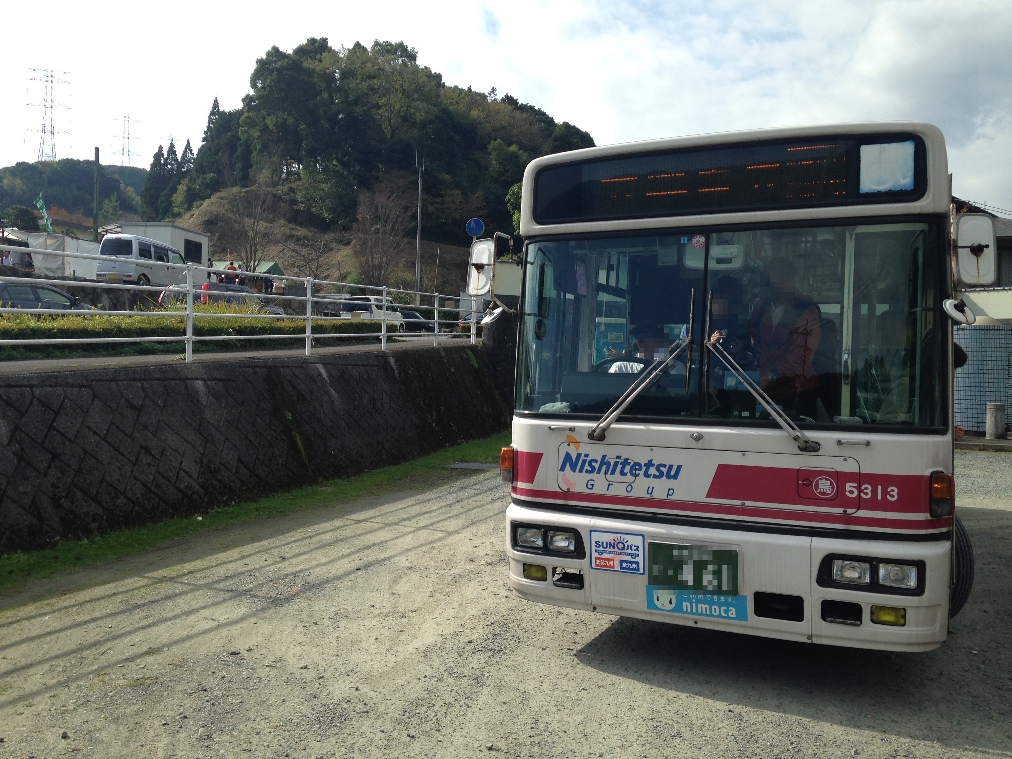 大興善寺行きの西鉄臨時バス